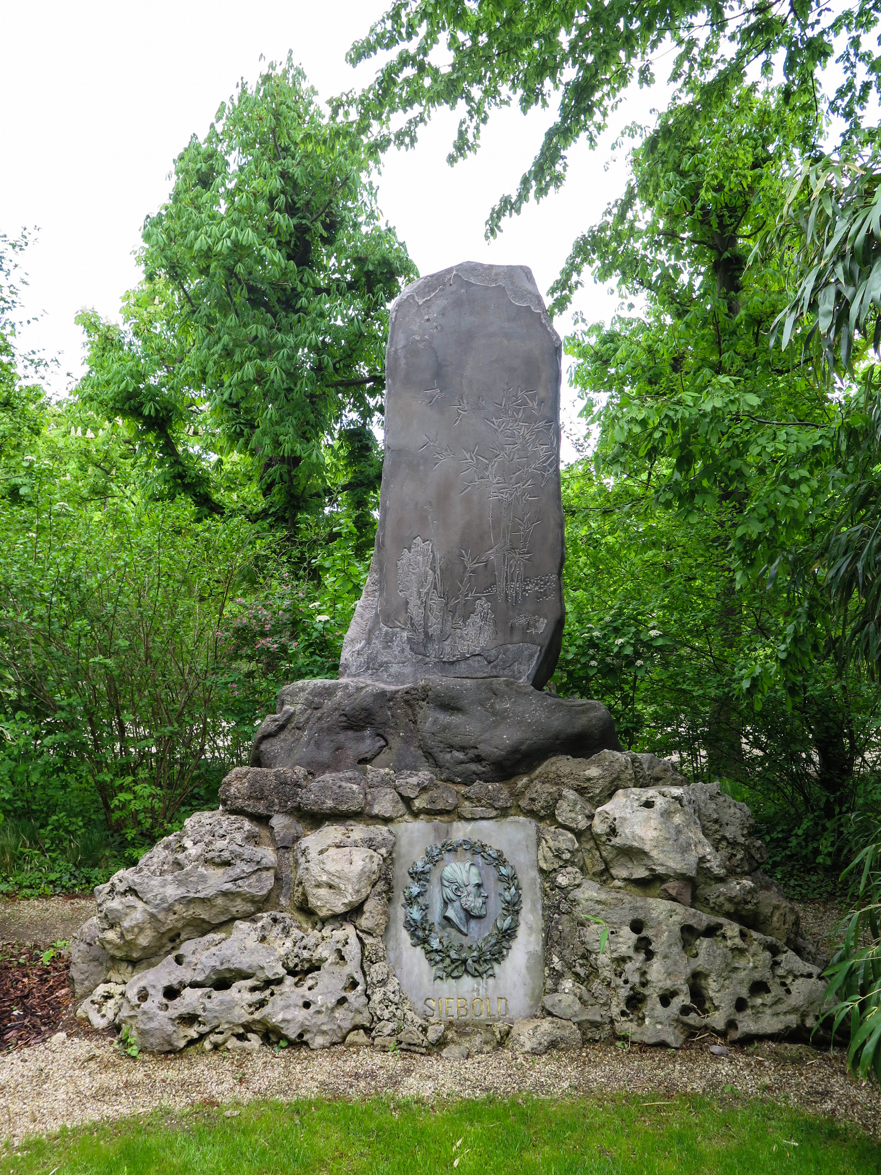 Philipp Franz Siebold Denkmal im Schlosspark Schönbrunn, beim Japanischen Garten.